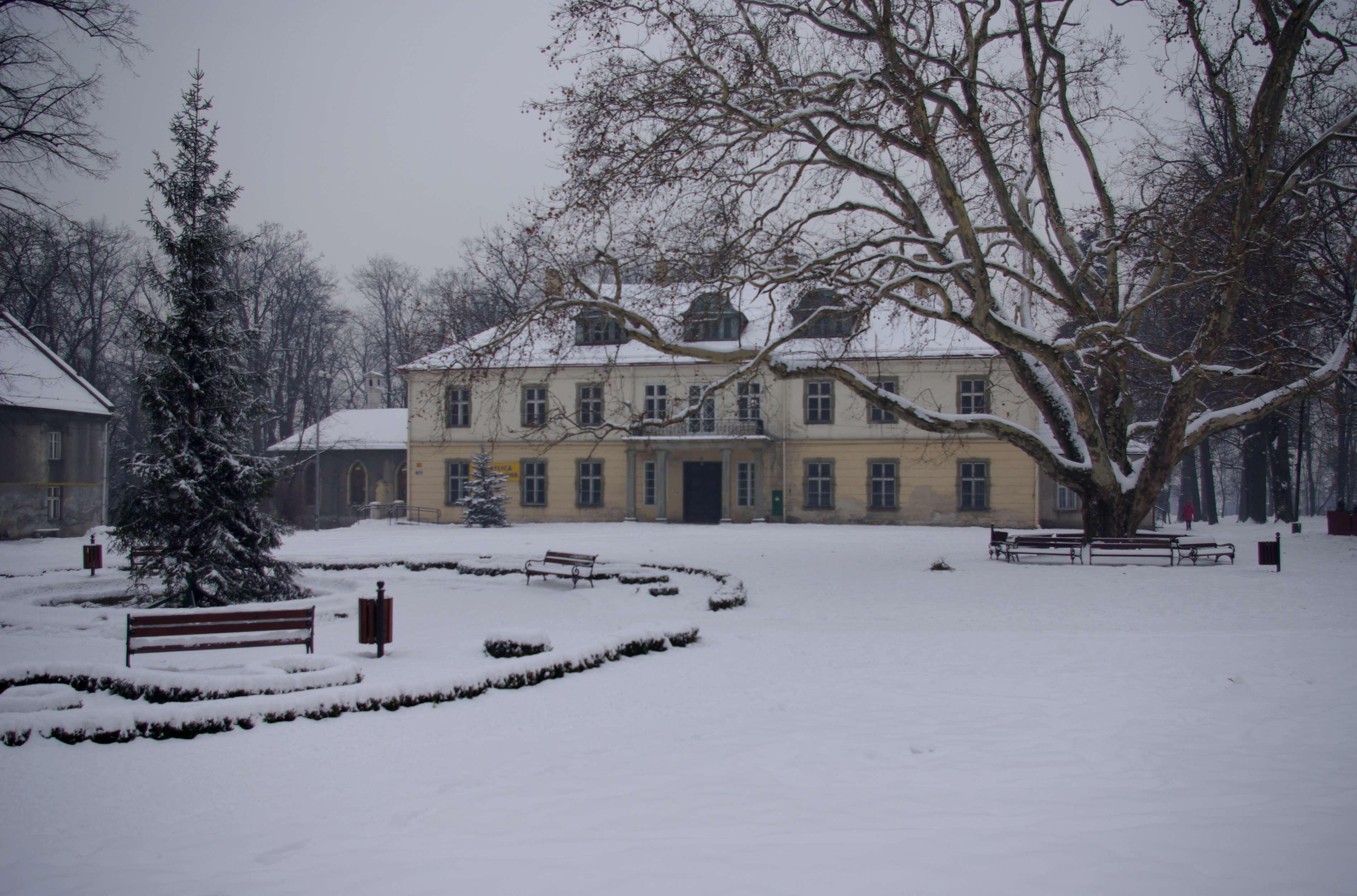 Palac z XVIII wieku w Kozach.